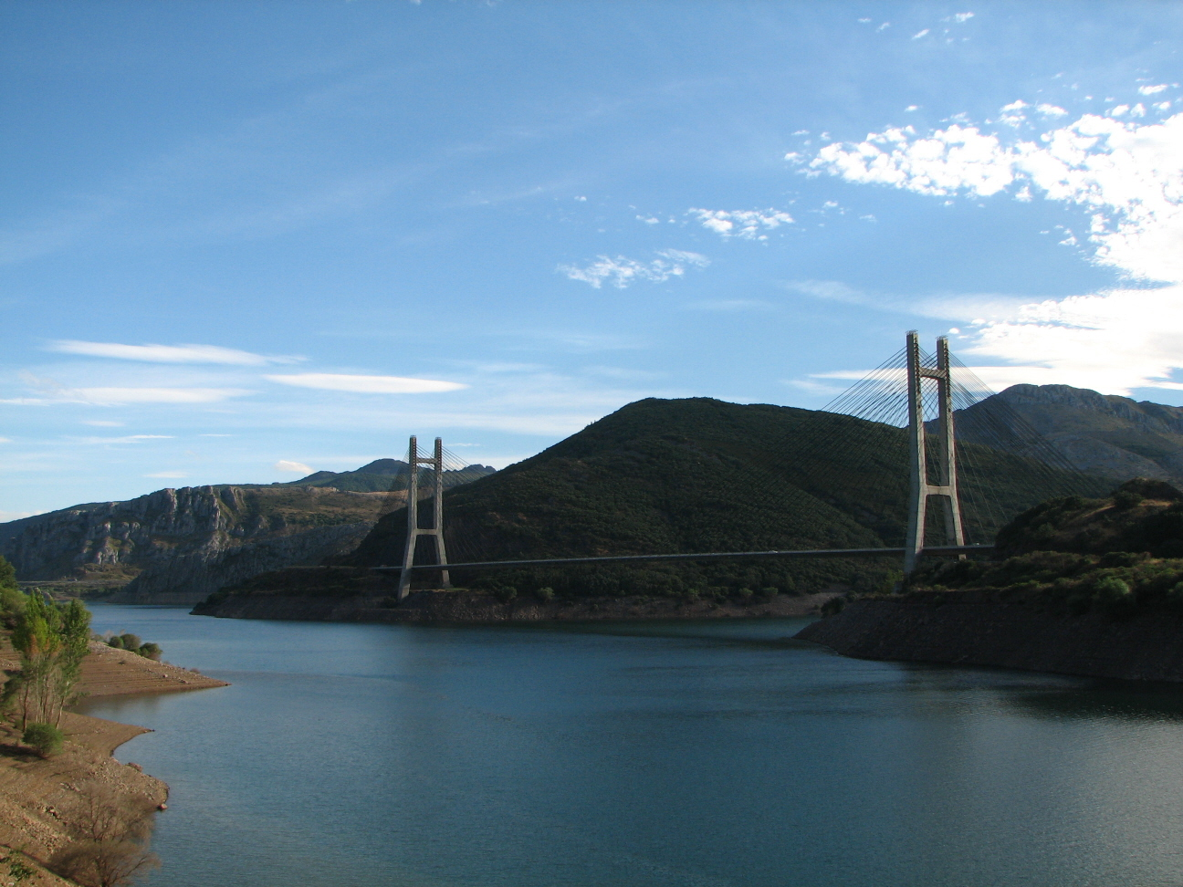 Pantano de Luna (León)